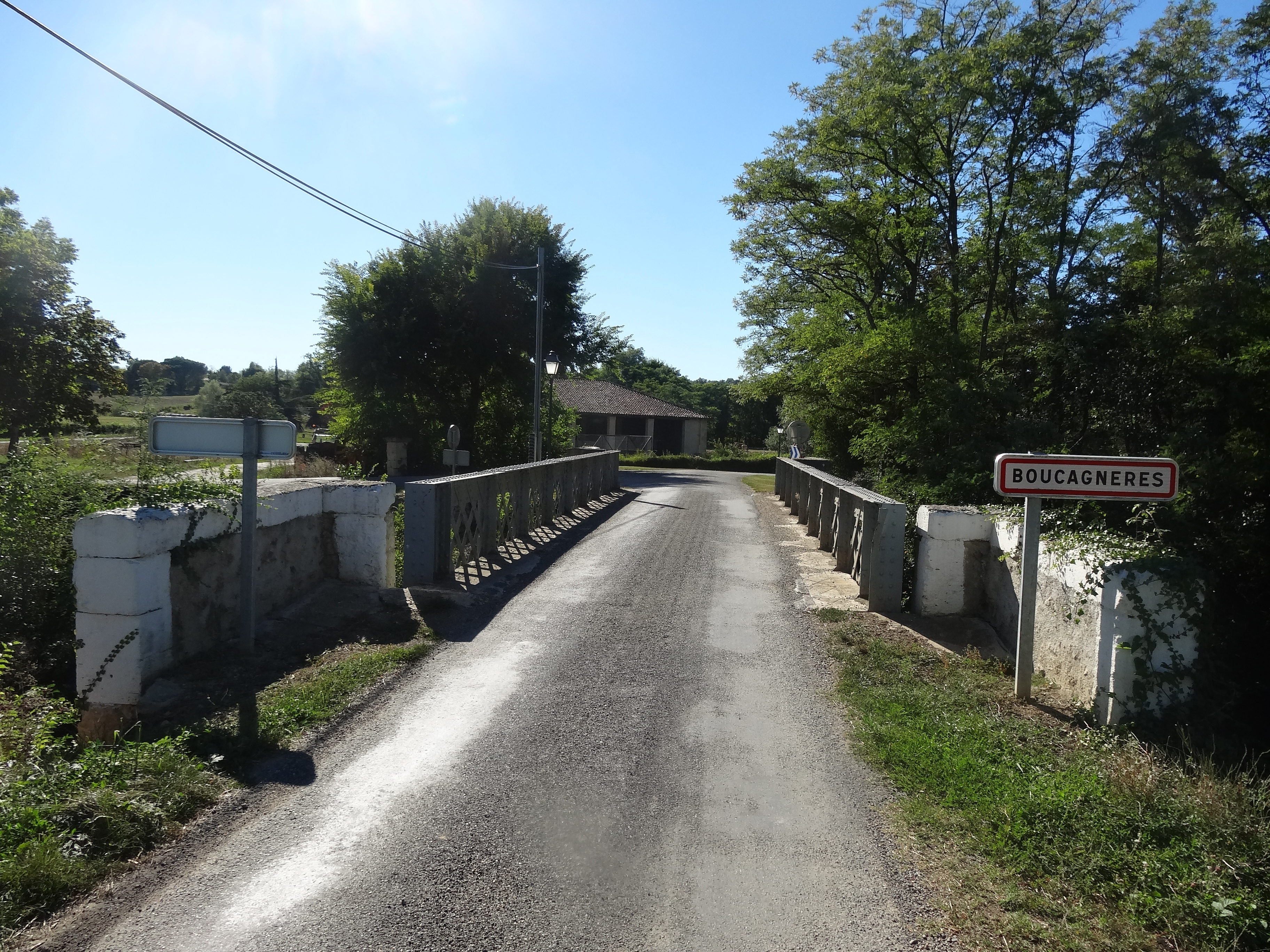 Pont de 1902.